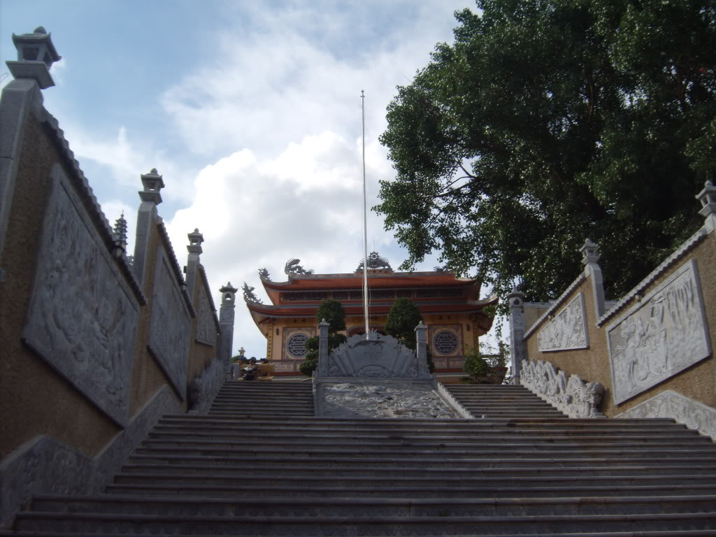 Mặt trước của chùa Phổ Minh thành phố Buôn Ma Thuột